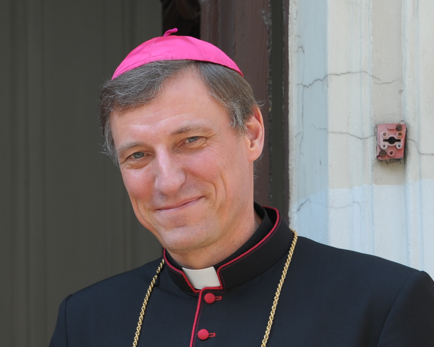 2011.gada 21.aprīlī Ministru prezidents Valdis Dombrovskis tikās ar Romas Katoļu baznīcas Latvijā Rīgas arhidiecēzes arhibīskapu metropolītu Zbigņevu Stankēviču.